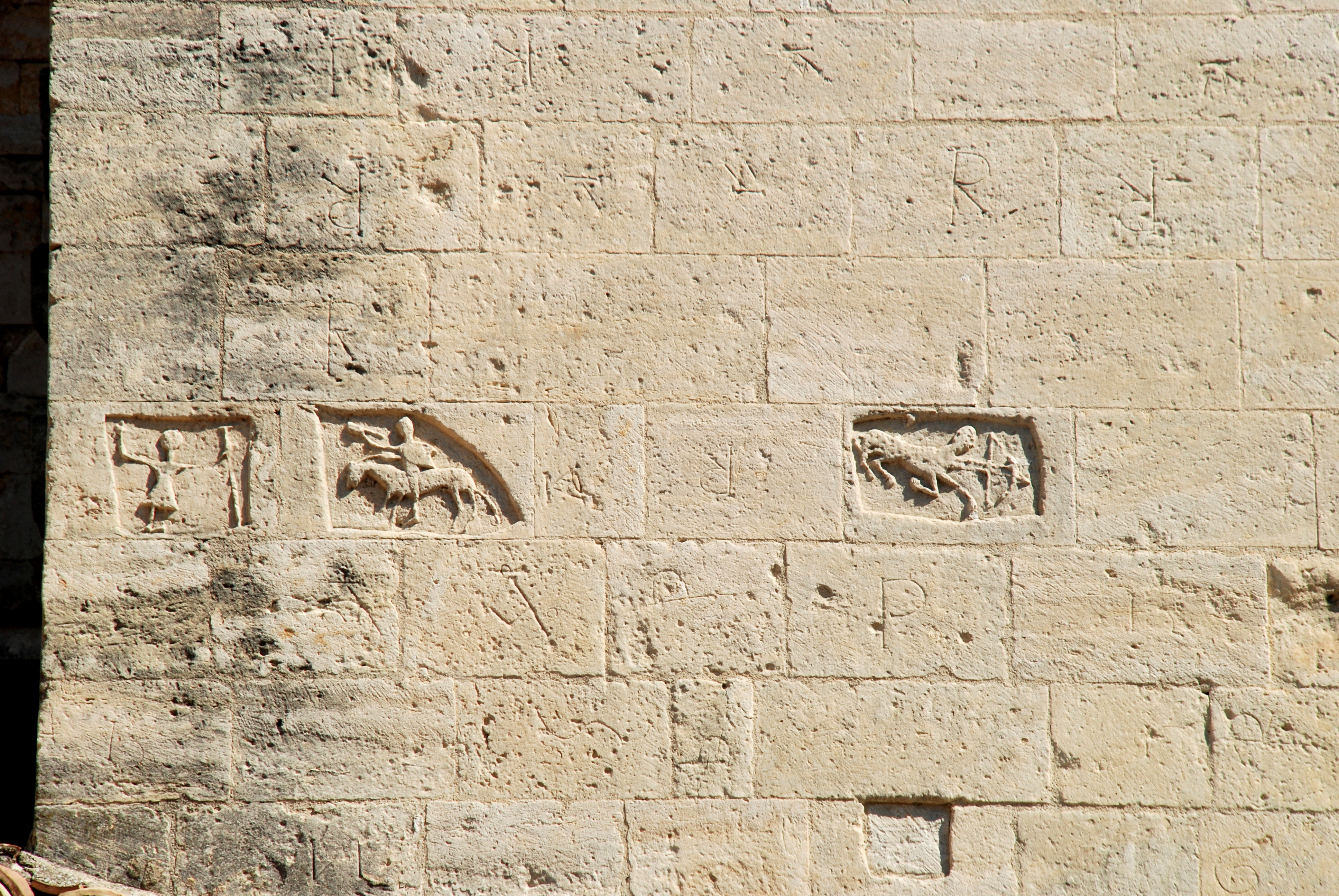 Cathédrale Notre-Dame de Saint-Paul-Trois-Châteaux